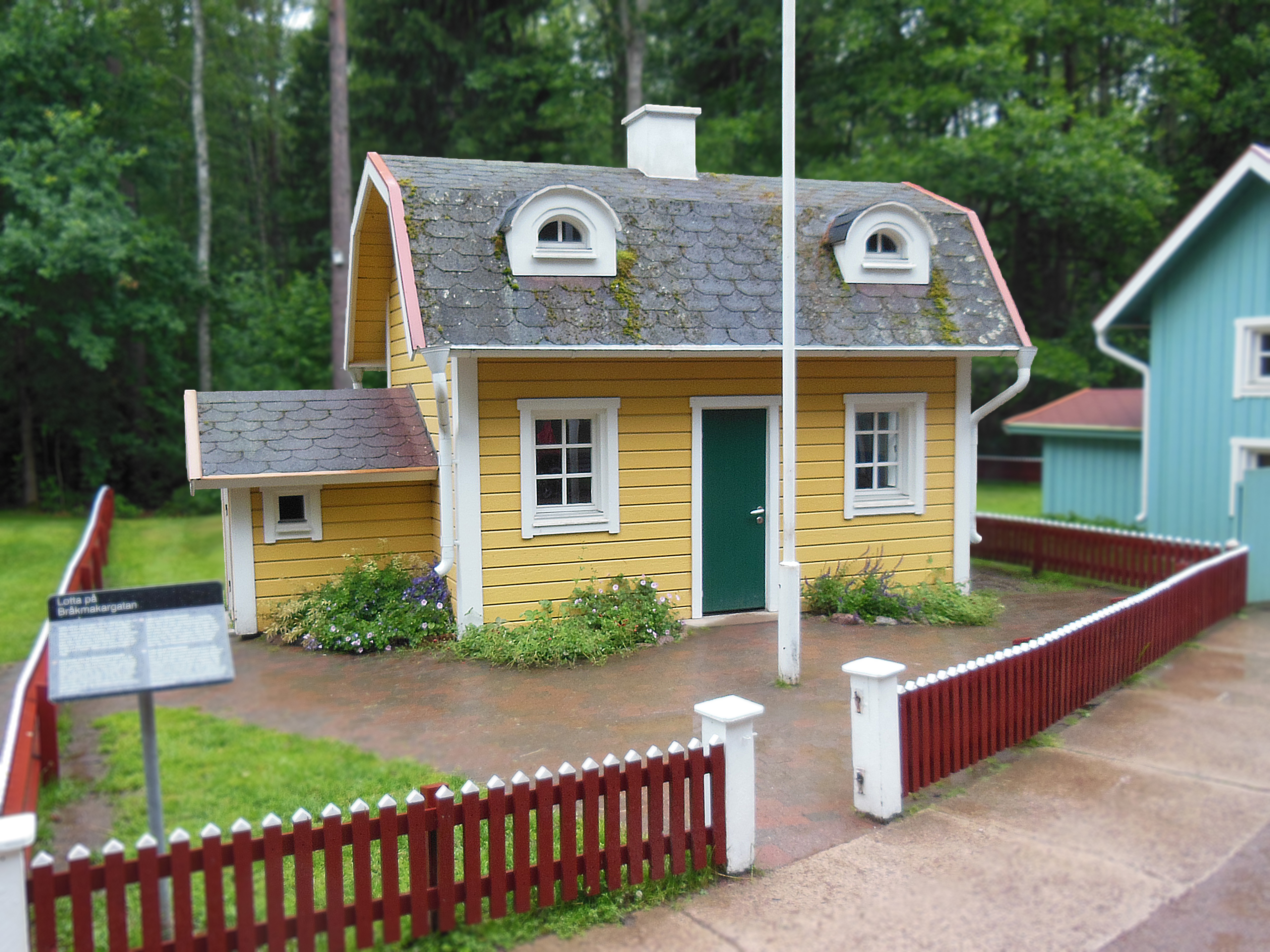 En liten version av Lotta på Bråkmakargatans hus på Astrid Lindgrens Värld i Vimmerby